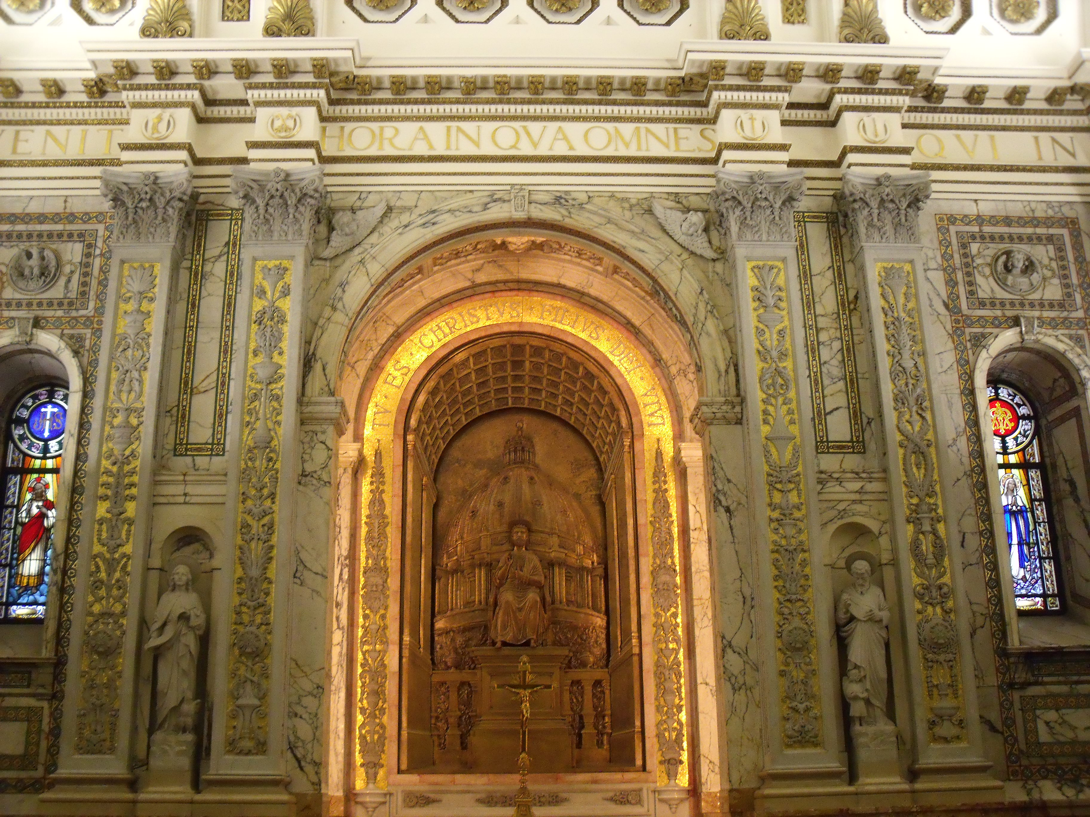 Mur est de la chapelle funéraire des évêques, Cathédrale Marie-Reine-du-Monde (Anciennement Cathédrale Saint-Jacques)